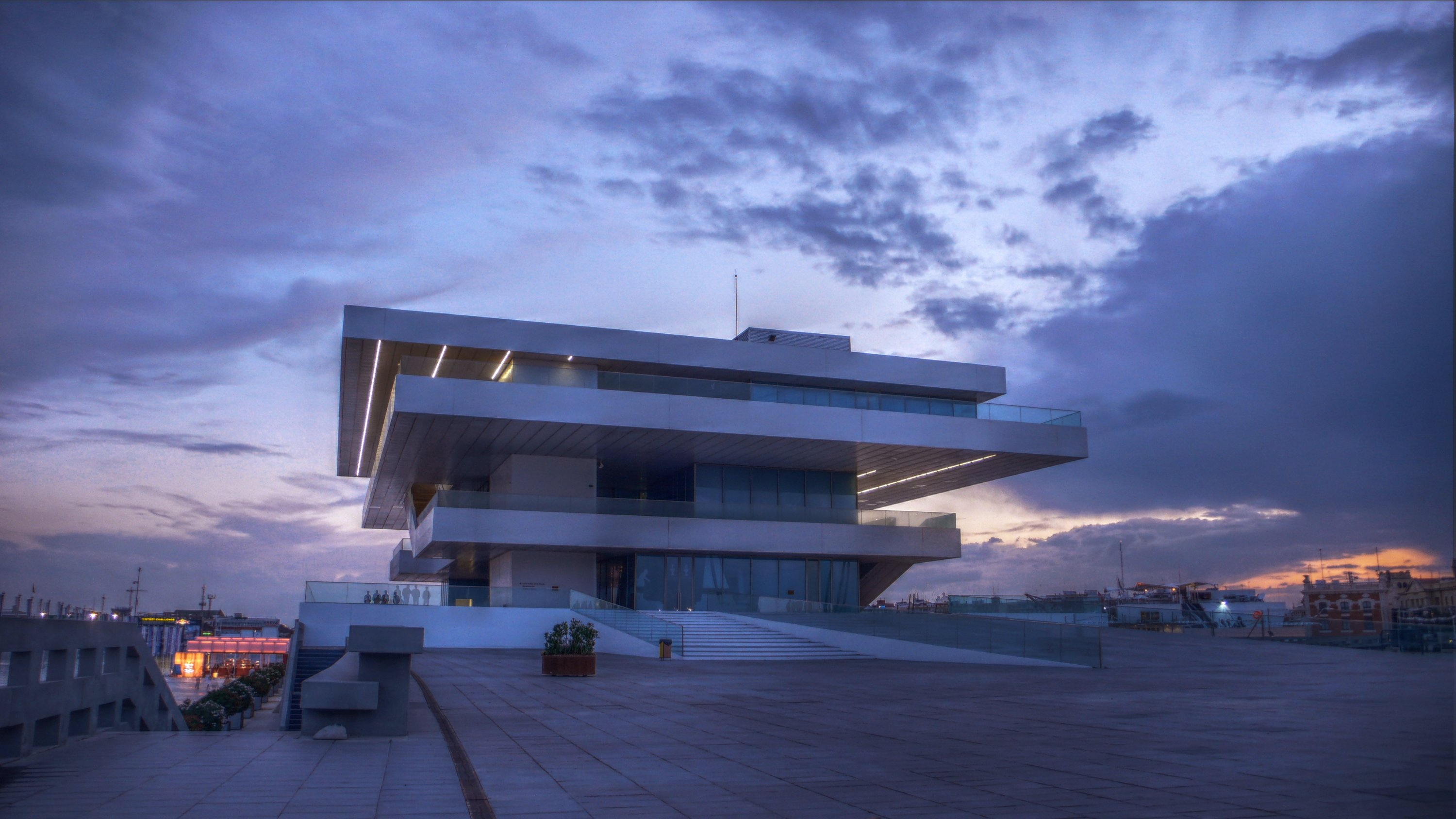 Edificio de invitados de la America's Cup proyectado por David Chipperfield y levantado por Fermín Vázquez. El nombre viene de un poema de Ausiàs March.